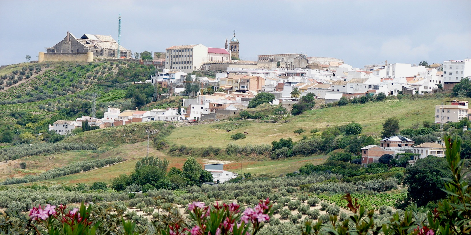 Vista de Montilla (Córdoba, España).